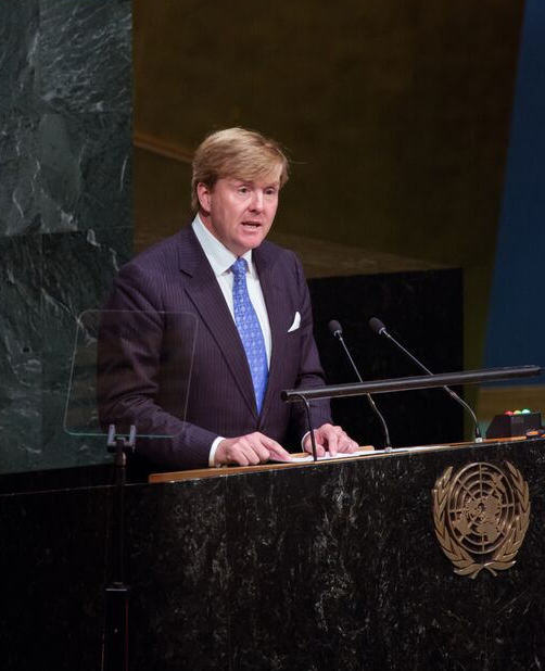 Koning Willem Alexander houdt toespreek bij VN